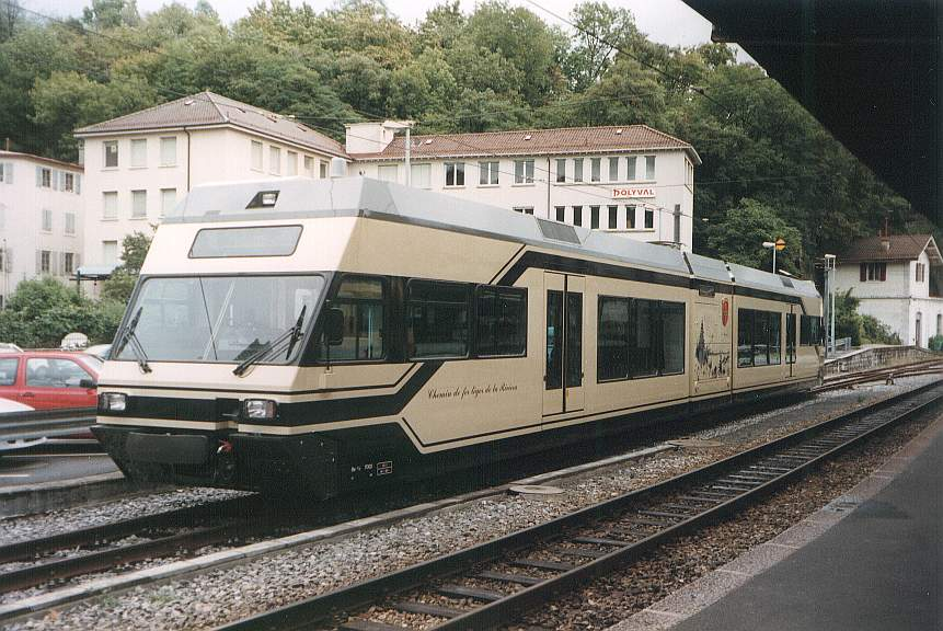 Description